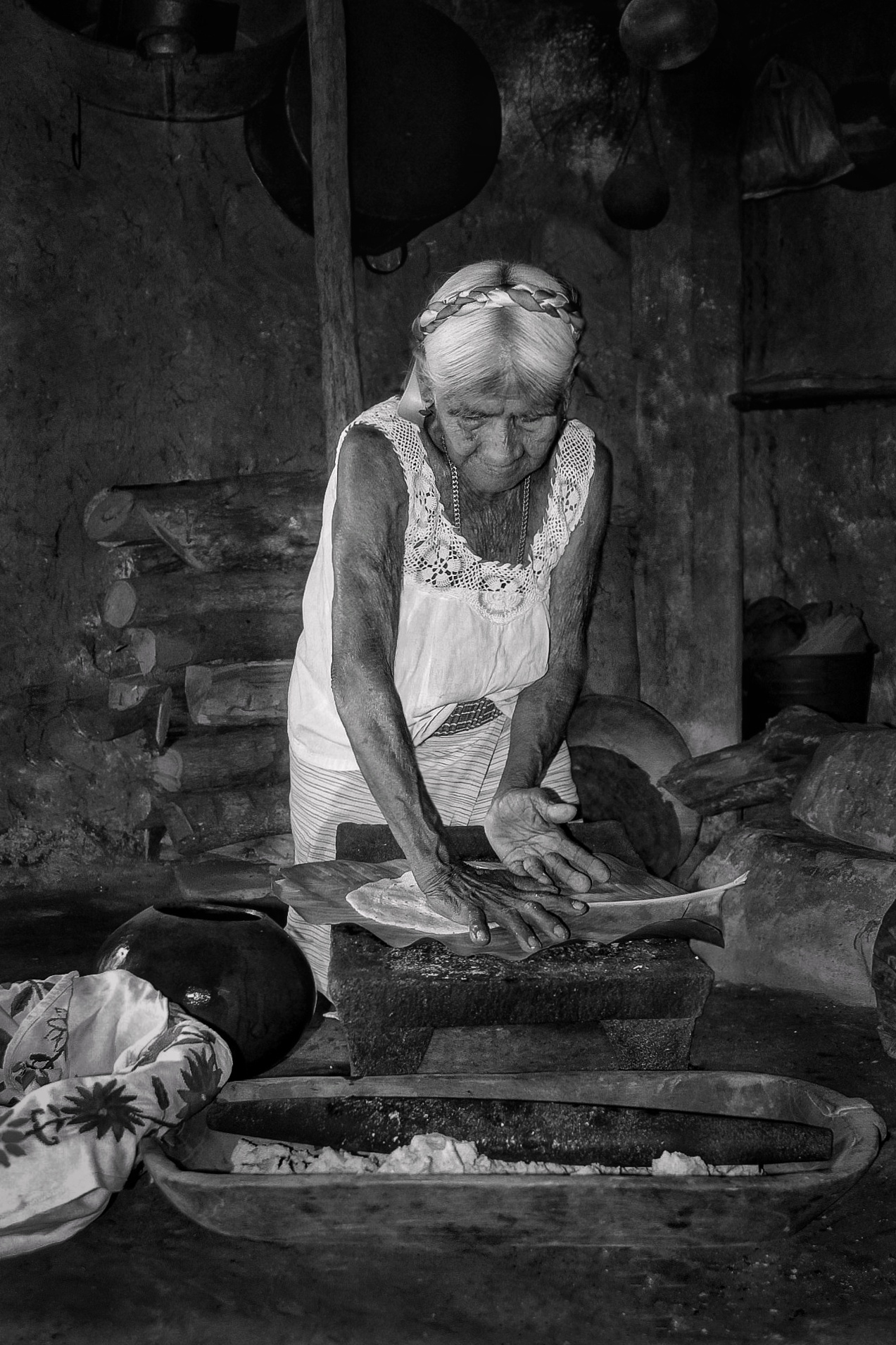 la fotografía muestra la cultura indígena nahua del pueblo de Zaragoza Veracruz, donde las mujeres fueron los pilares de la familia, cuando no existía celofán que ahora se utiliza actualmente, ellas utilizaban hojas, a ras de suelo con el metate, su canasta con el mantel y su olla , todo alrededor de la mujer.